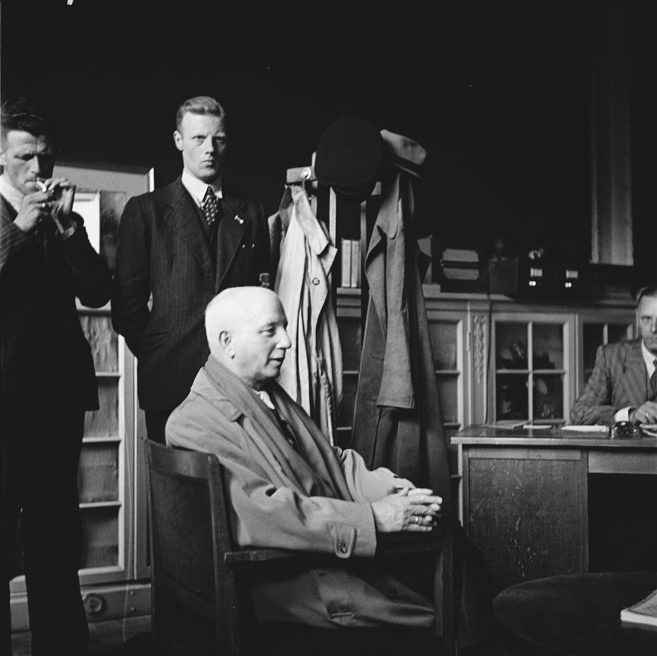 Nationaal Archief Beschrijving: Verhoor van Max Blokzijl, de radiopropagandist van de NSB. Blokzijl werd in september 1945 door het Bijzonder Gerechtshof in Den Haag ter dood veroordeeld en gefusilleerd. Datum: mei 1945 Vervaardiger: Anefo / fotograaf onbekend Bestanddeelnummer: 900-2861 URL: [1] Voor meer informatie over het Nationaal Archief: Voor meer foto's uit deze en andere collecties, bezoek onze Beeldbank:, U kunt ons helpen onze kennis van de fotocollecties te verrijken door tags en commentaren toe te voegen. Herkent u mensen of locaties of heeft u een bijzonder verhaal te vertellen bij één van de foto's, laat dan een reactie achter (als u ingelogd bent bij Flickr) of stuur een mailtje naar